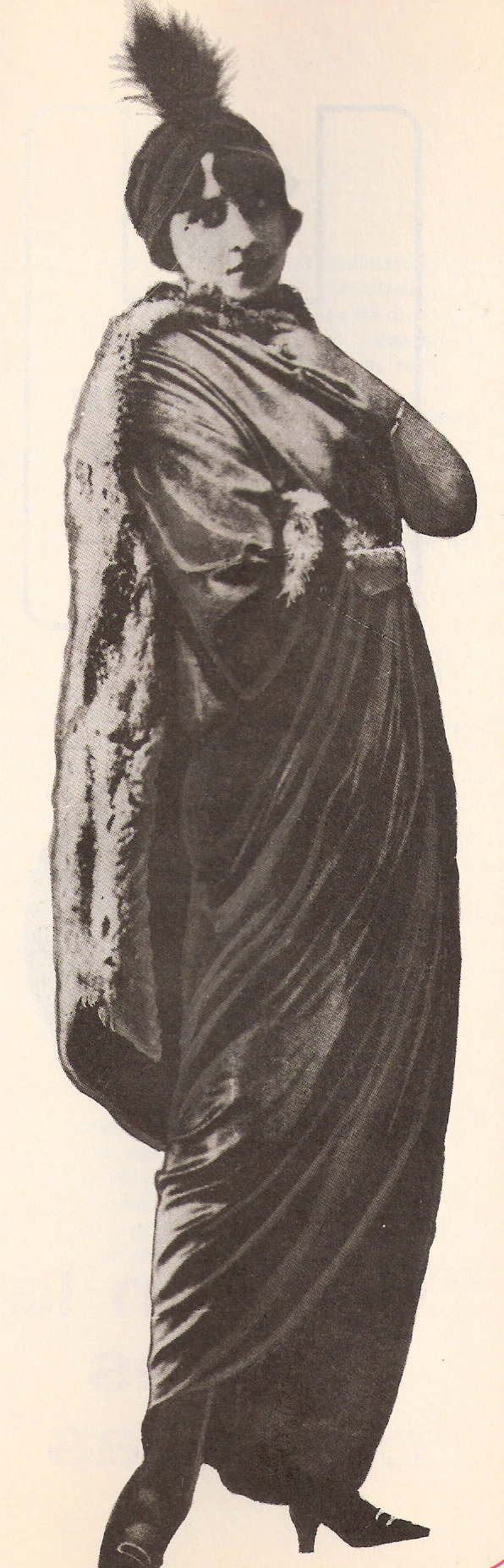 escritora argentina Victoria Ocampo